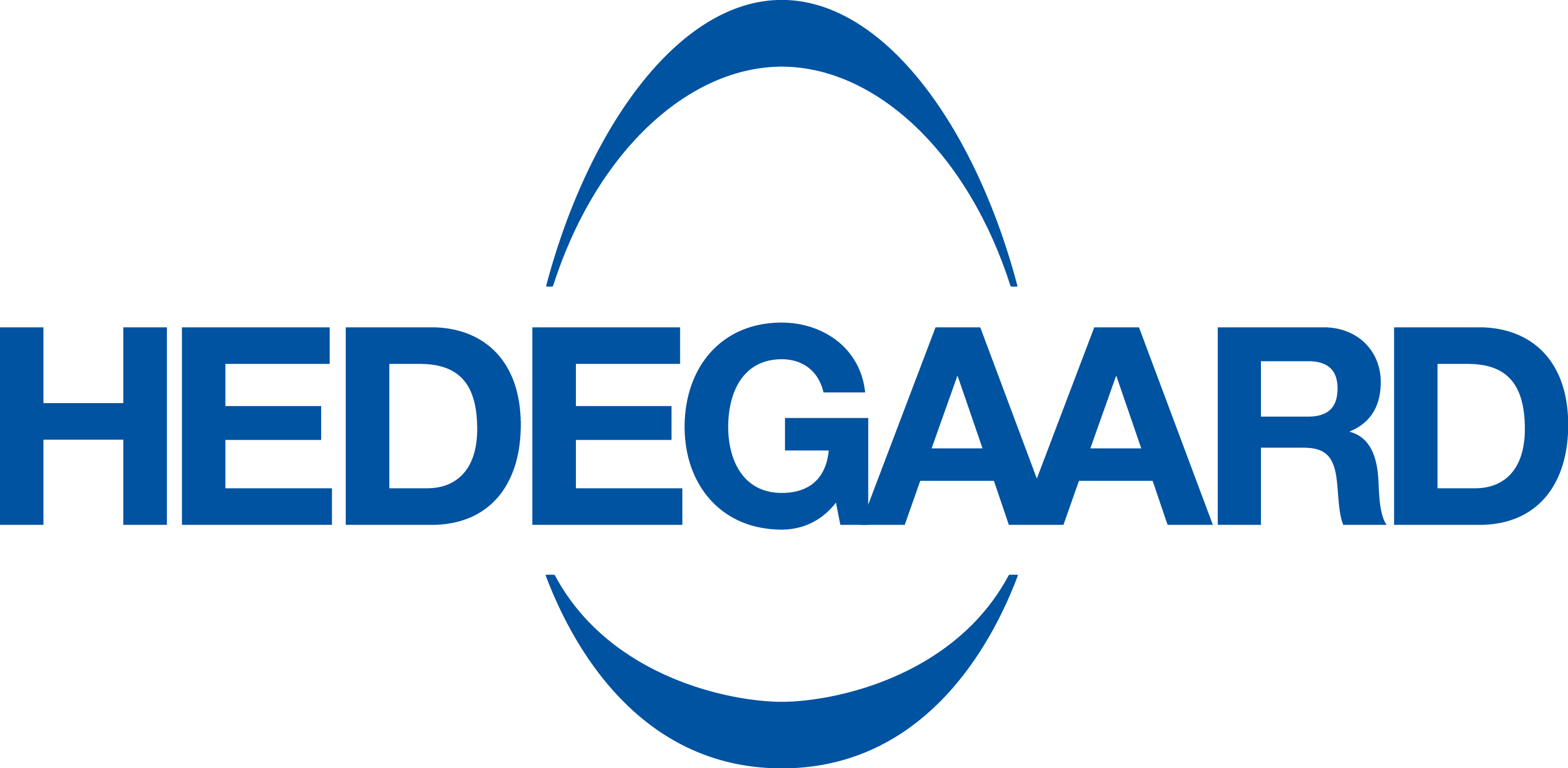 Hedegaard Foods's logo. Hedegaard Foods A/S er en dansk fremstillings- distributions- og pakkerivirksomhed. Virksomheden pakker og distribuerer skalæg, desuden produceres pasteuriserede og kogte æggeprodukter. Hedegaard Foods har sit hovedsæde i Hadsund. Tilladelse givet til brug på Wikipedia af Mette Due Andersen Projektchef i Hedegaard Foods. Scandinavian Design Lab, har designede logoet tilbage i 2006.